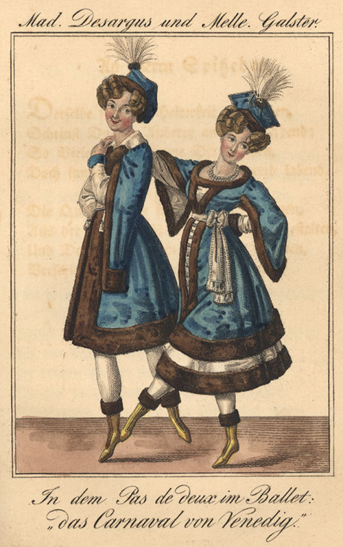 Kirchhoff: Mad. Desargus und Melle. Galster In dem Pas de deux im Ballet „Das Carneval von Venedig“